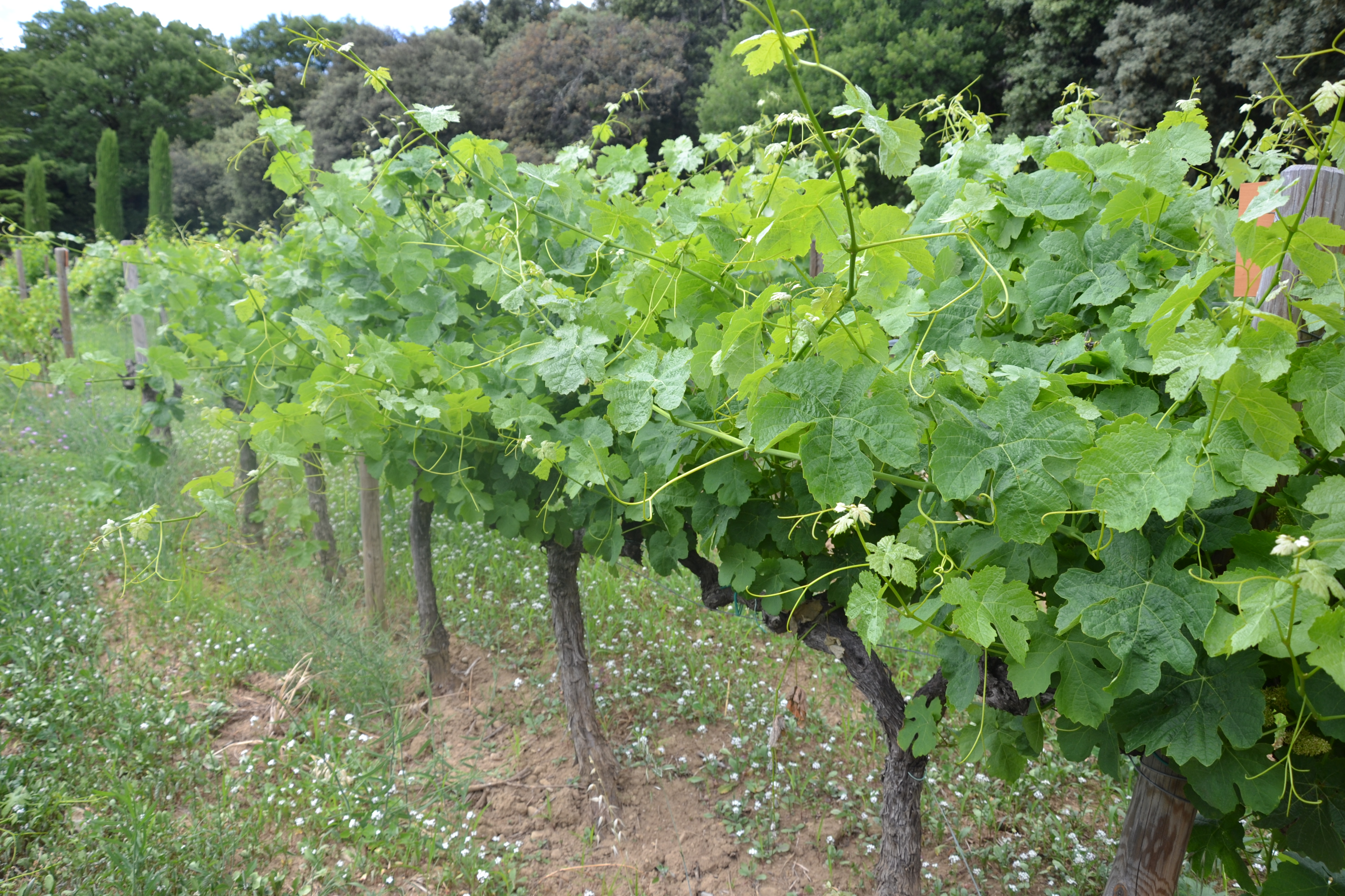 vignes de cépage Marsanne